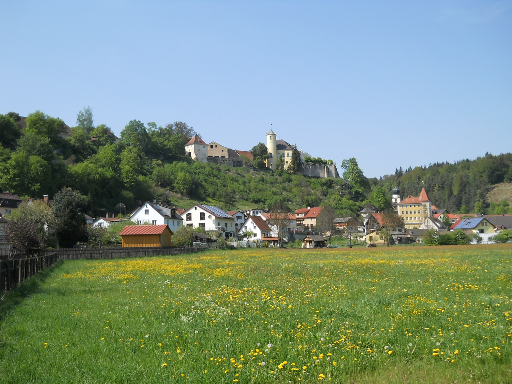 Möhren, Ortsteil vom Treuchtlingen, mit (rechts) Schutzengelhaus, Turm der Pfarrkirche und mit dem Schloss